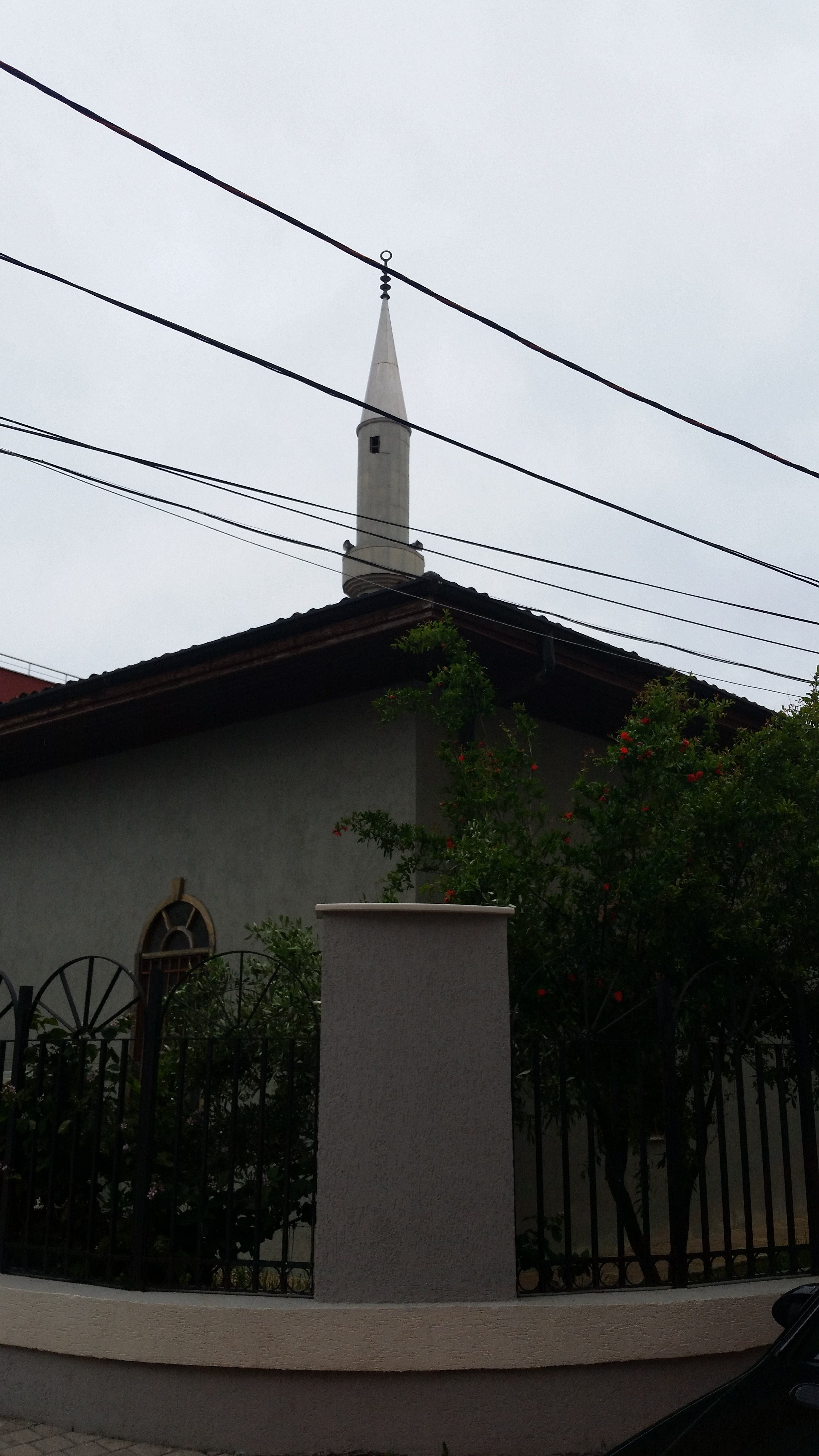 Xhamia mbret njihet ndryshe edhe si xhamia Fat'hi